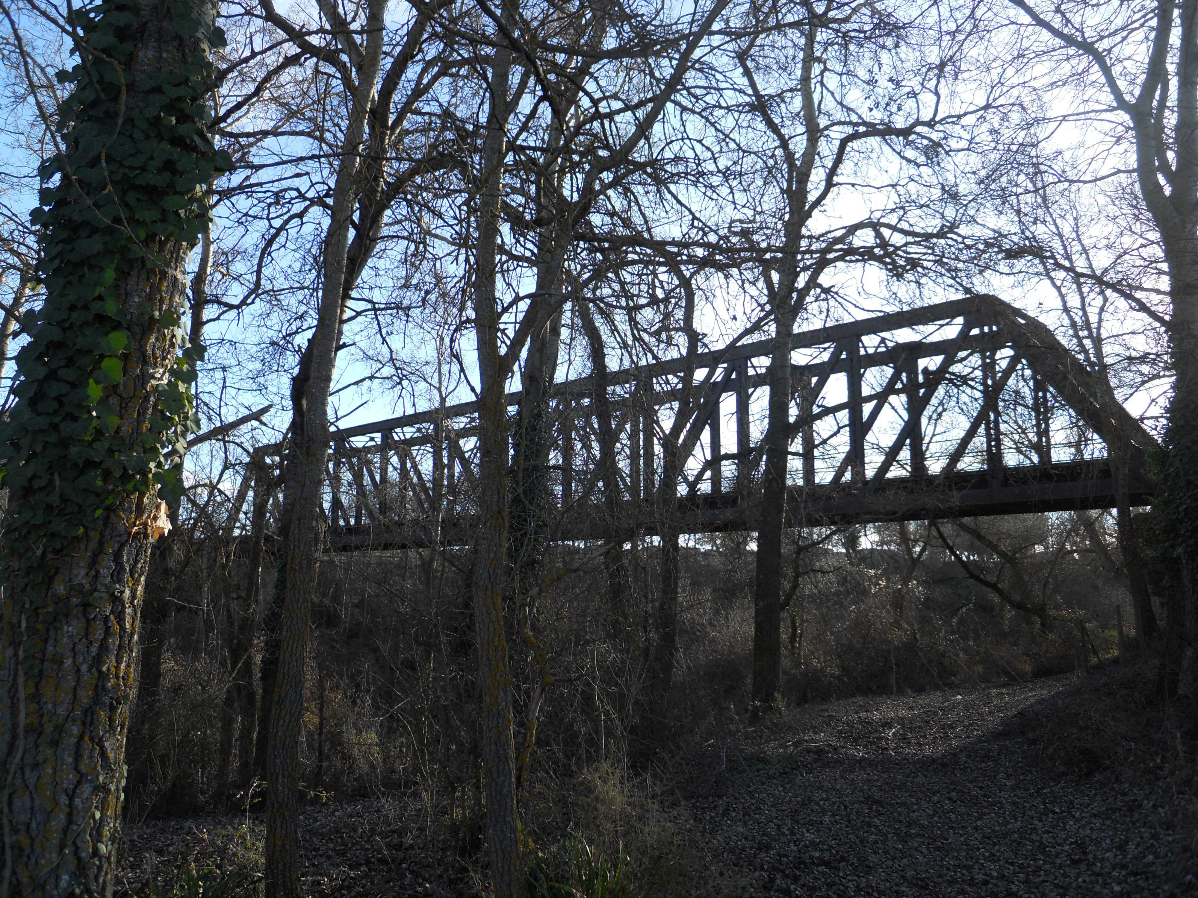 Puente de Hierro (Escuela Eiffel)